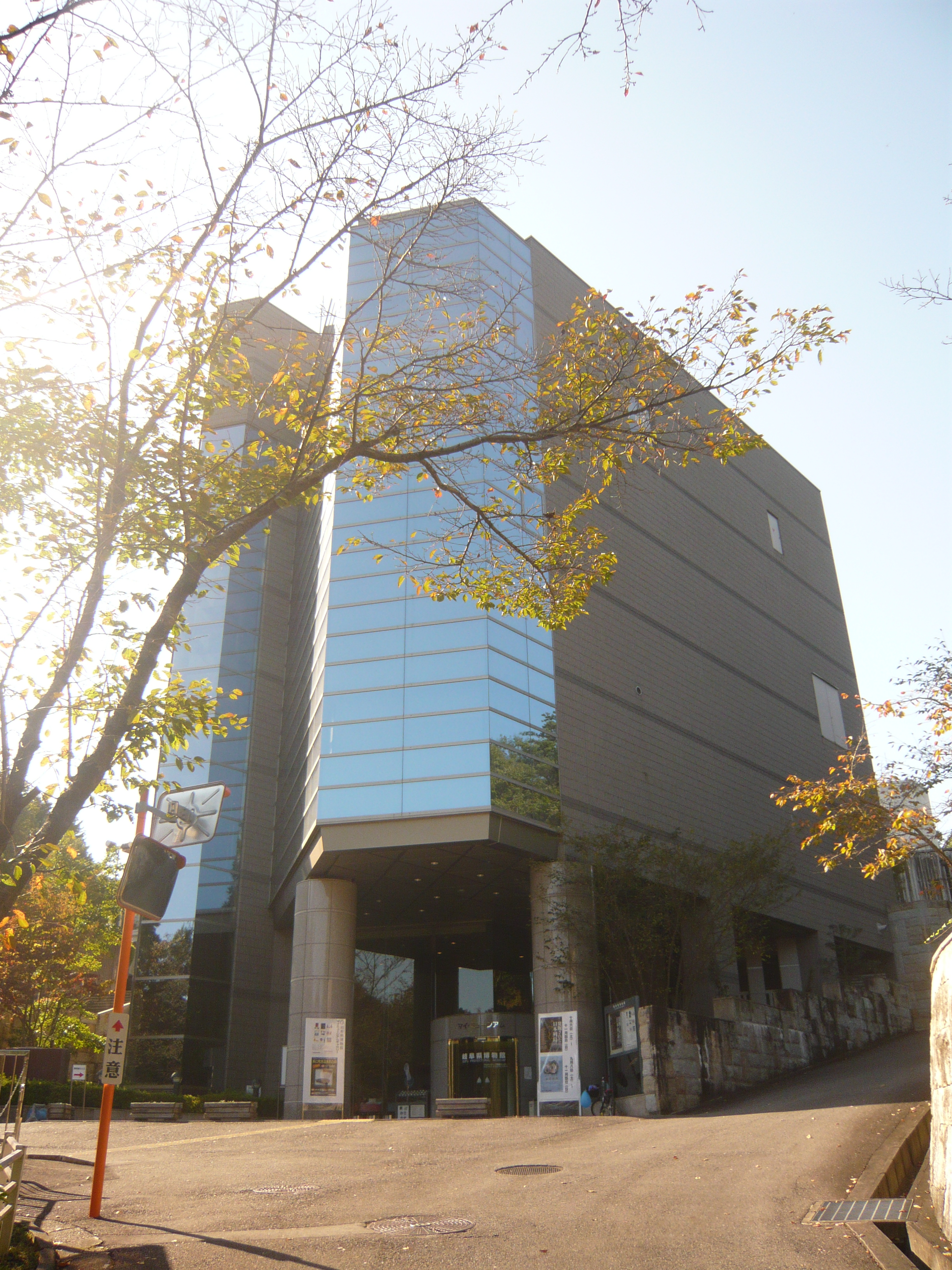 Gifu Prefectural Museum 岐阜県博物館（岐阜県博物館）,Seki,Gifu,Japan（岐阜県関市）で撮影。